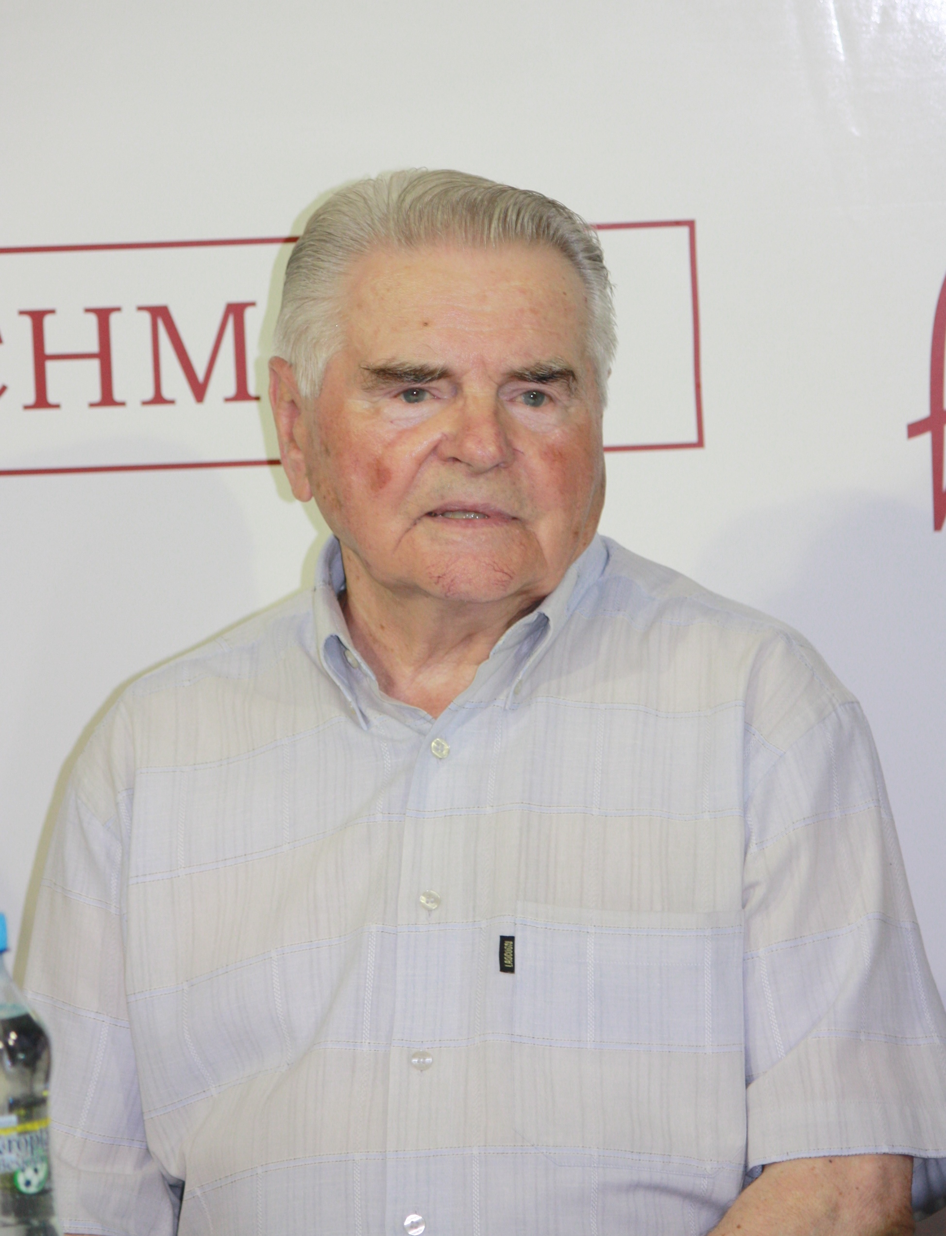 Piłkarz i trener piłkarski Lucjan Brychczy na Targach Książki w 2014.